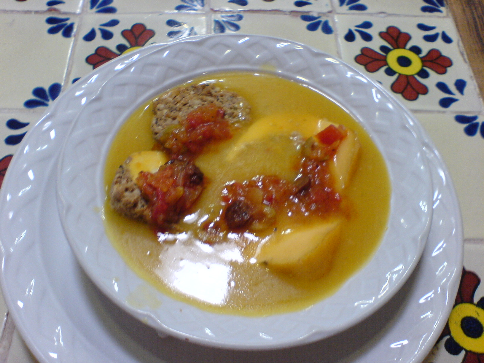 Queso Relleno al estilo del Restaurante Cantamayec